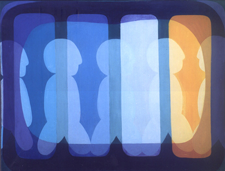 Շքերթ - Parade, յուղաներկ